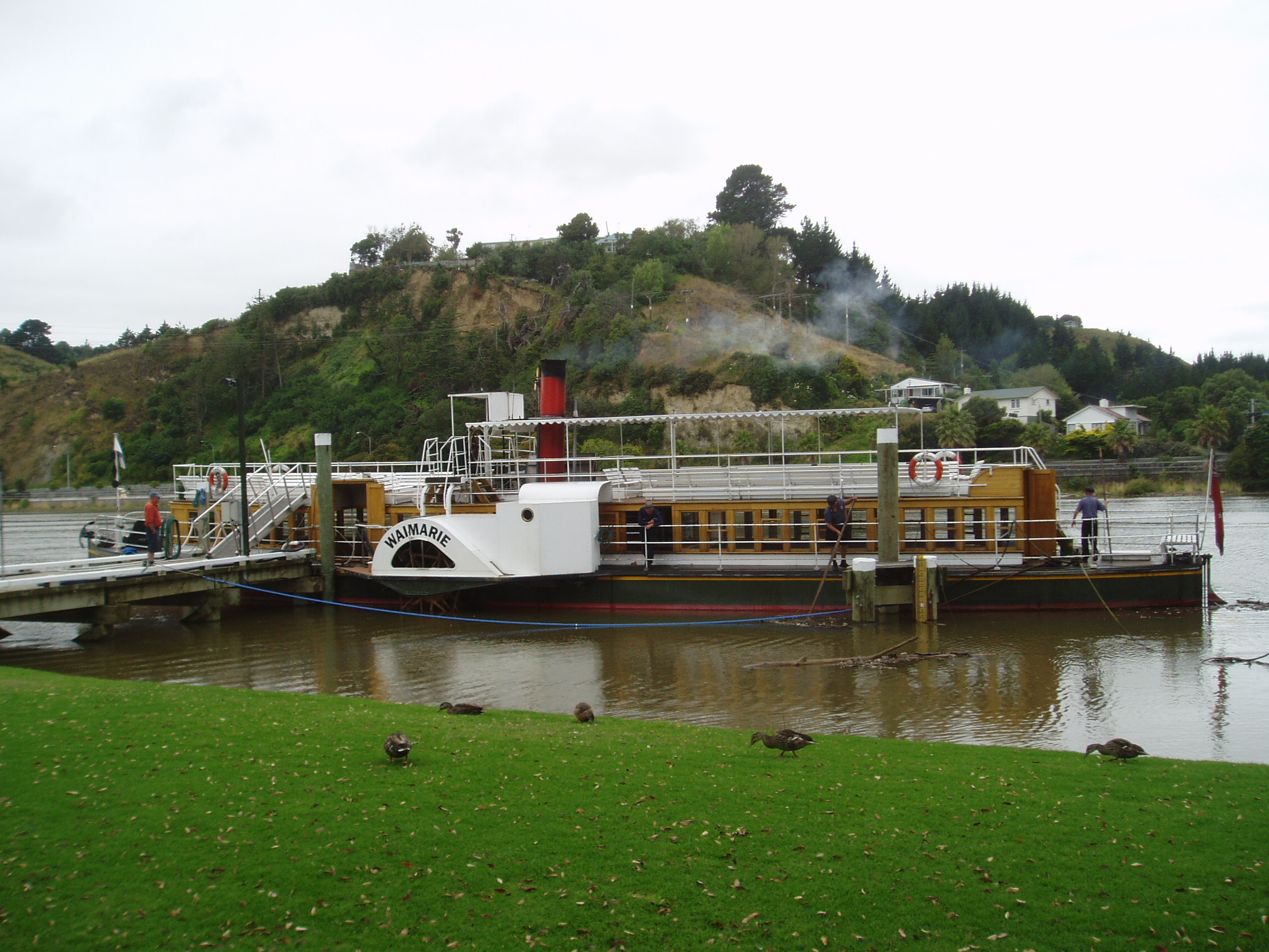 PS Waimarie